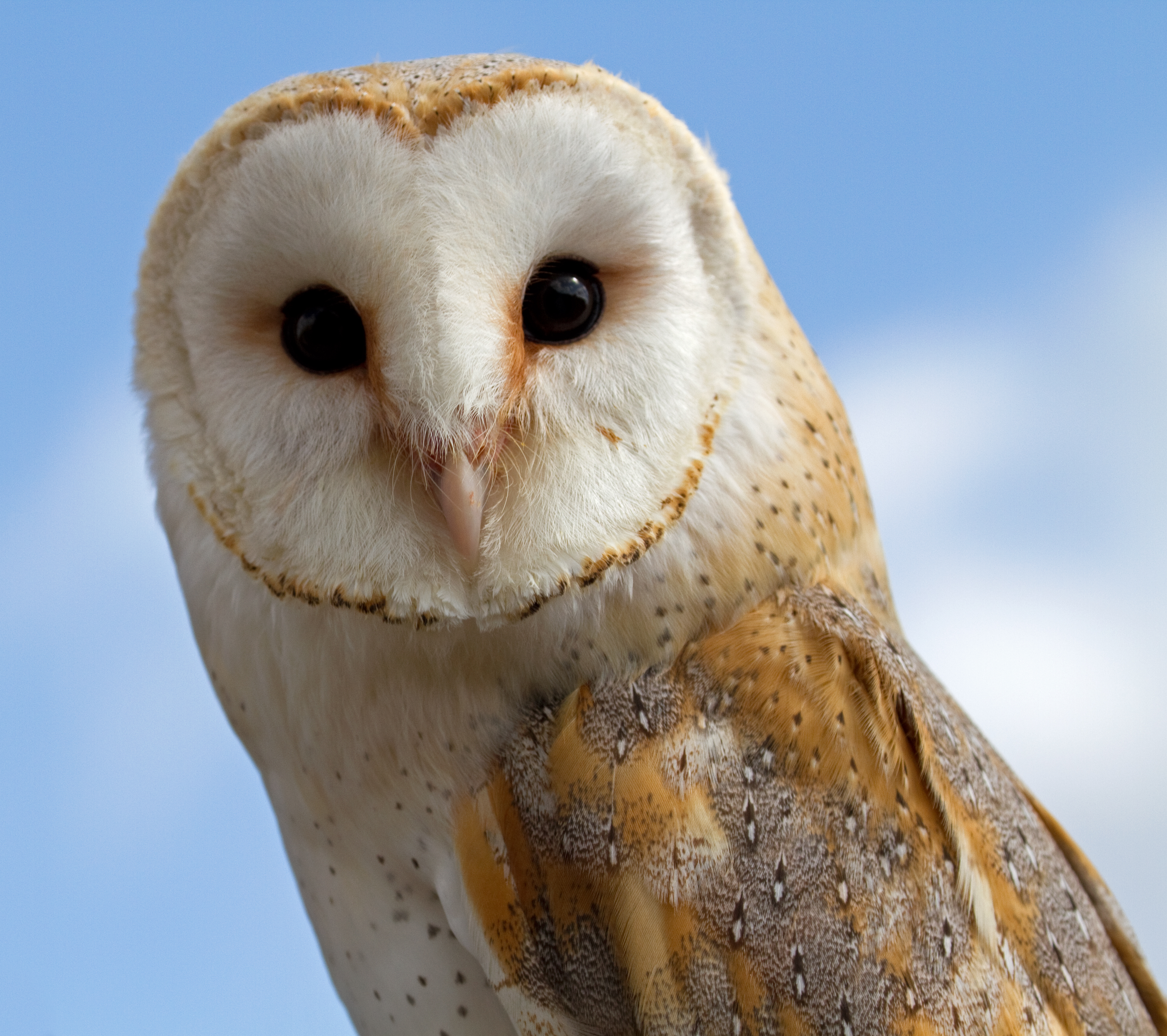 Female Barn Owl 2